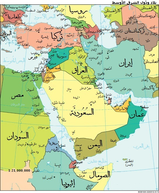 نسخة مُعرَّبة عن خريطة سياسيَّة لِلشرق الأوسط، من إنتاج وكالة الاستخبارات المركزيَّة الأمريكيَّة.